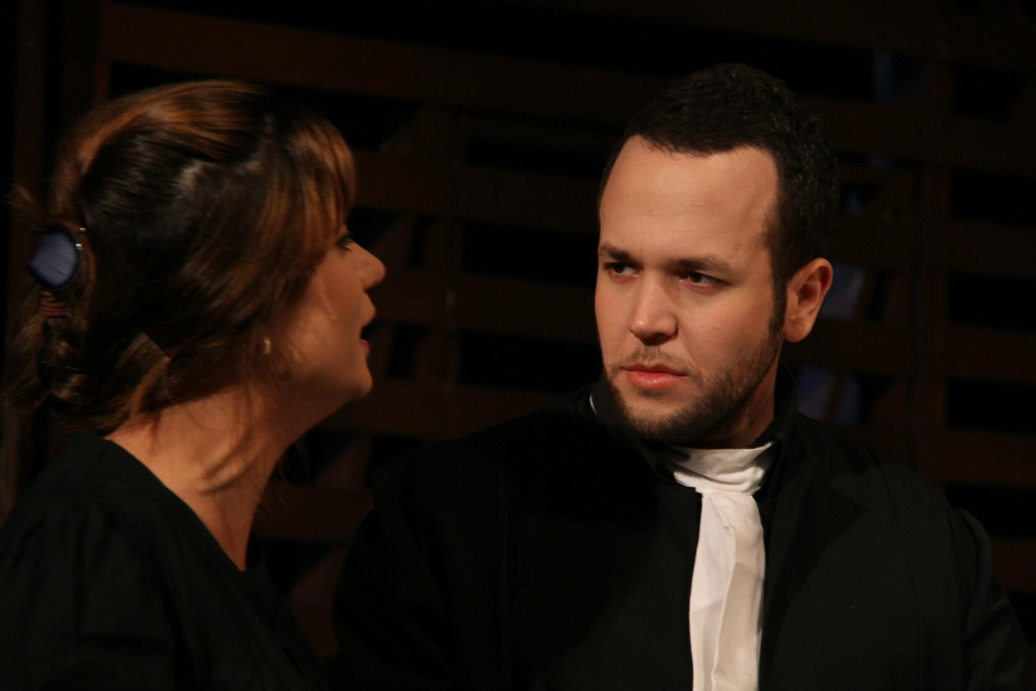 צילום: אידן אור גיא